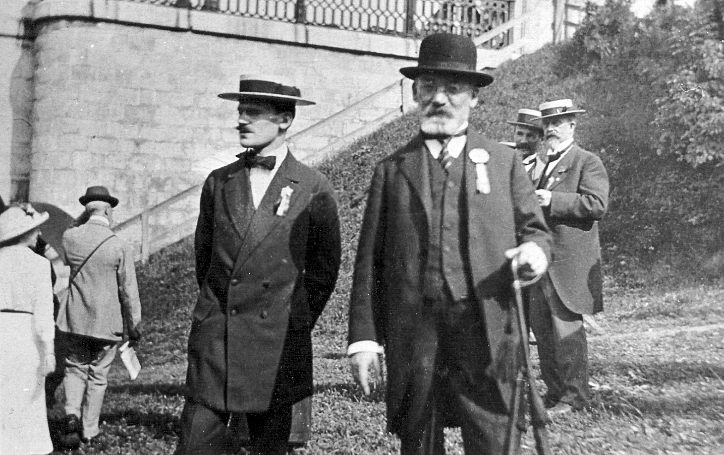 9. Esperanto-Weltkongress, Bern 1913. Einige Teilnehmer, im Vordergrund Adam und Ludwik Zamenhof